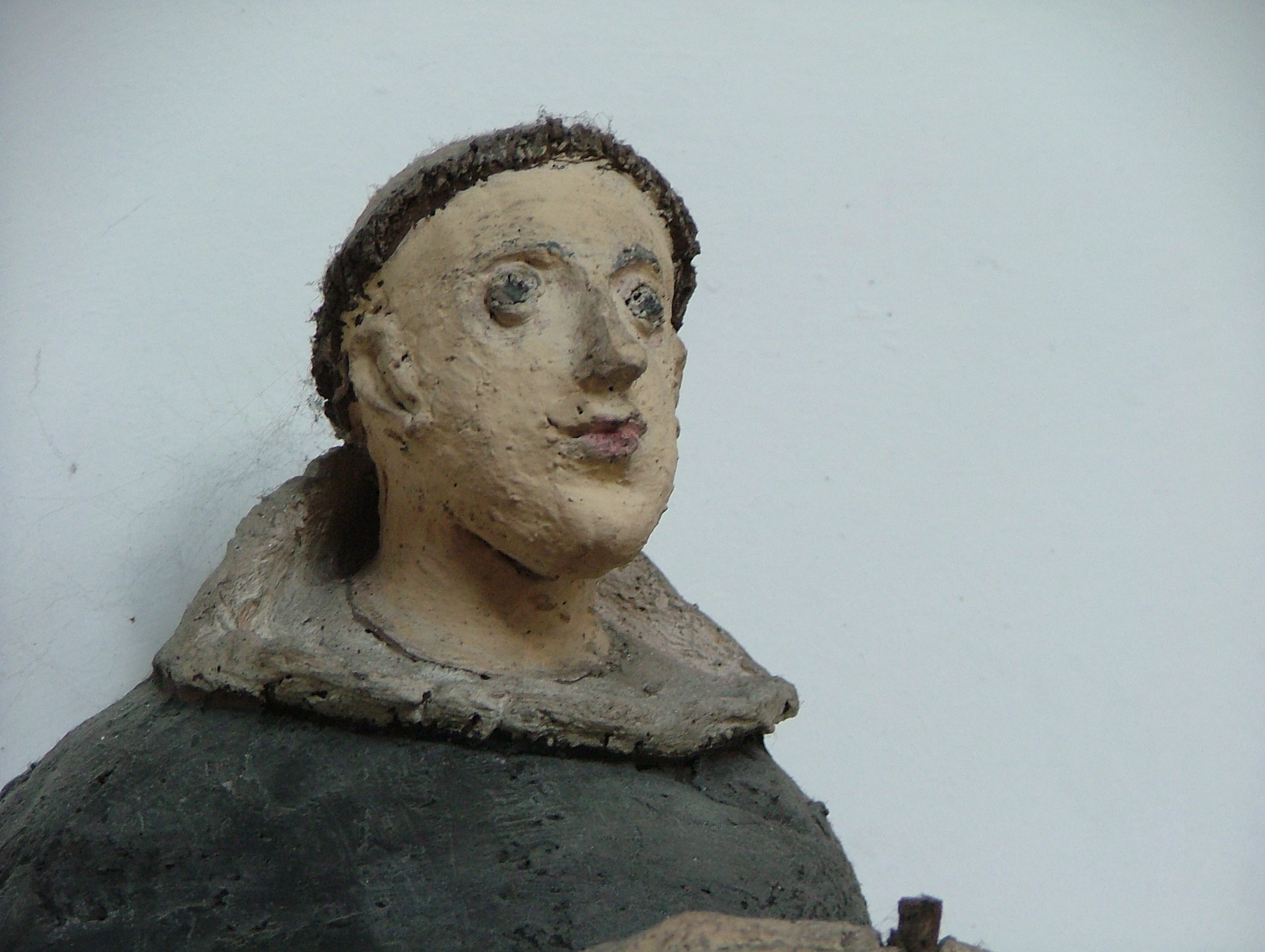 Heinrich Suso, Wengenkirche Ulm